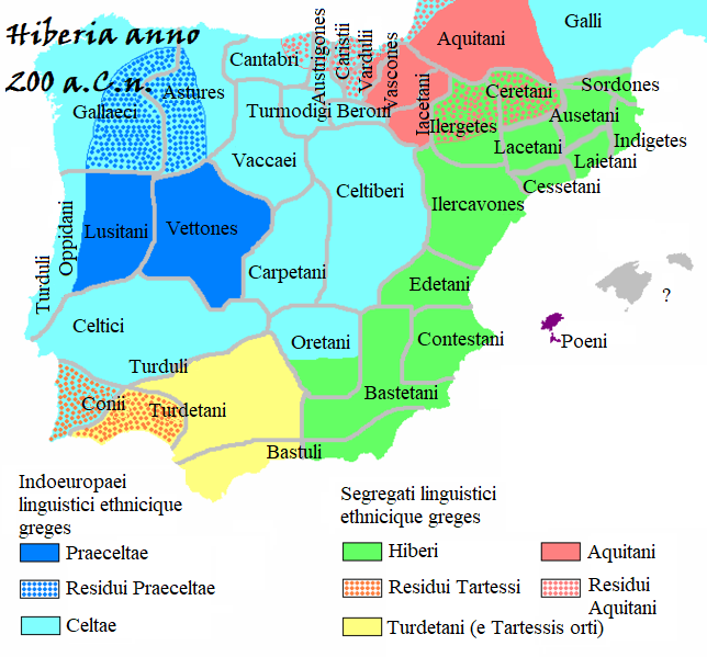 Hiberia anno 200 a.C.n.